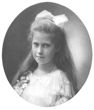 Margarete, Erzherzogin von Österreich-Toskana.